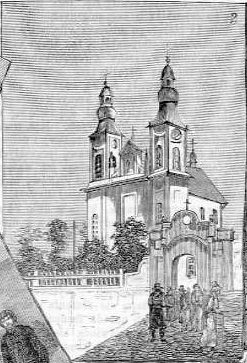 Костел Мурафа